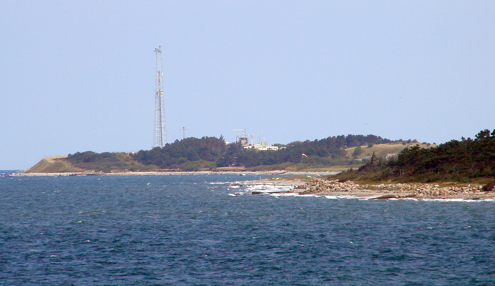 Spidsen af Sjællands Odde, Denmark